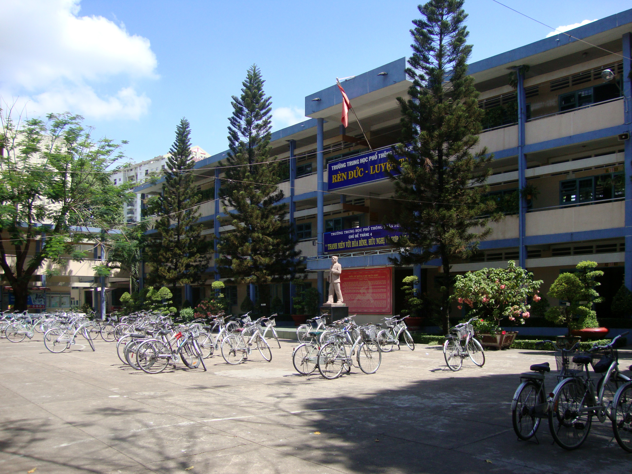 Sân trường THPT Trần Phú, Thành phố Hồ Chí Minh